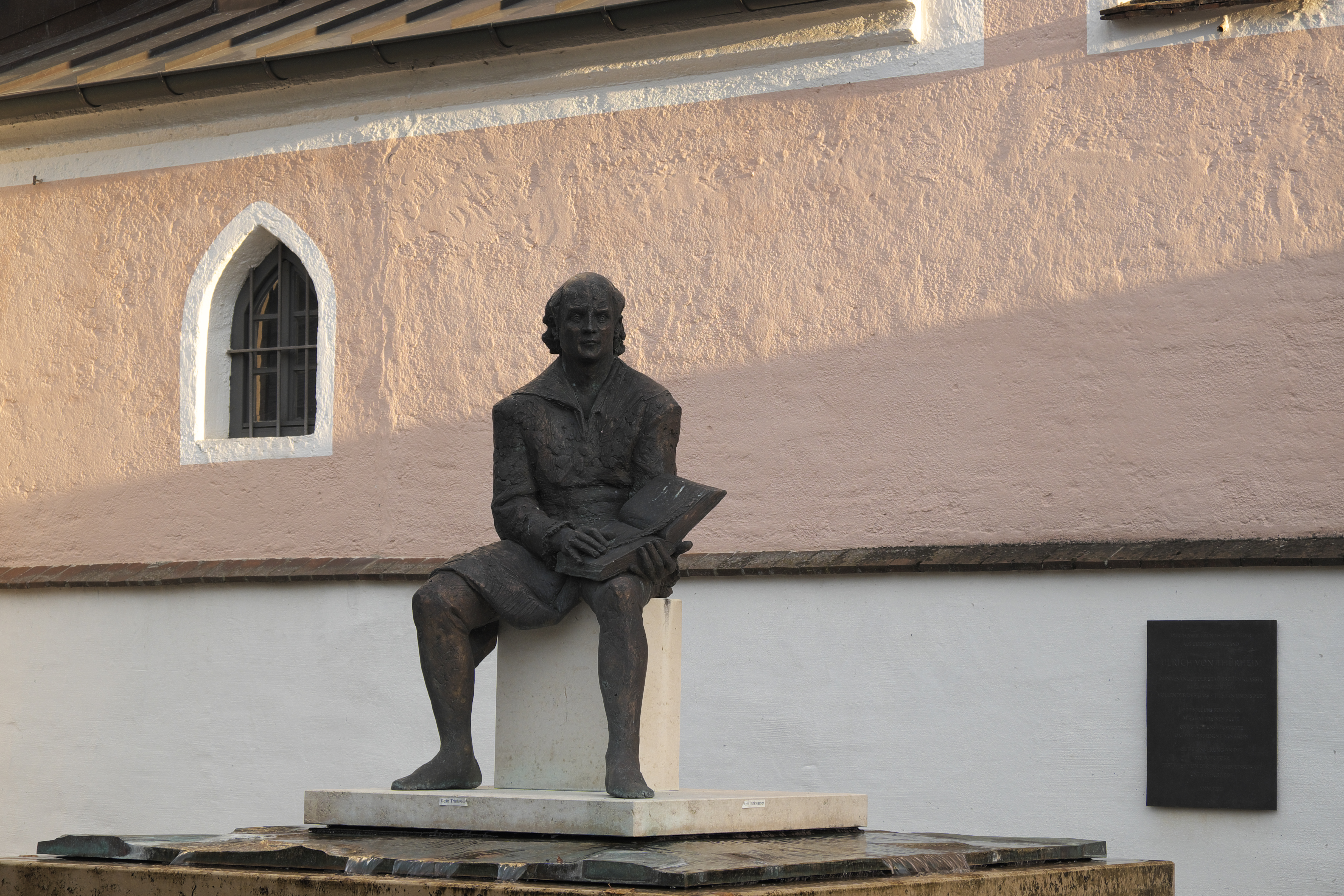 Denkmal für Ulrich von Türheim vor der katholischen Pfarrkirche Maria Hilf in Unterthürheim, einem Ortsteil von Buttenwiesen im Landkreis Dillingen an der Donau (Bayern)